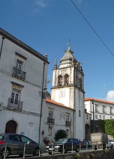 Bell tower of Leiria Cathedral